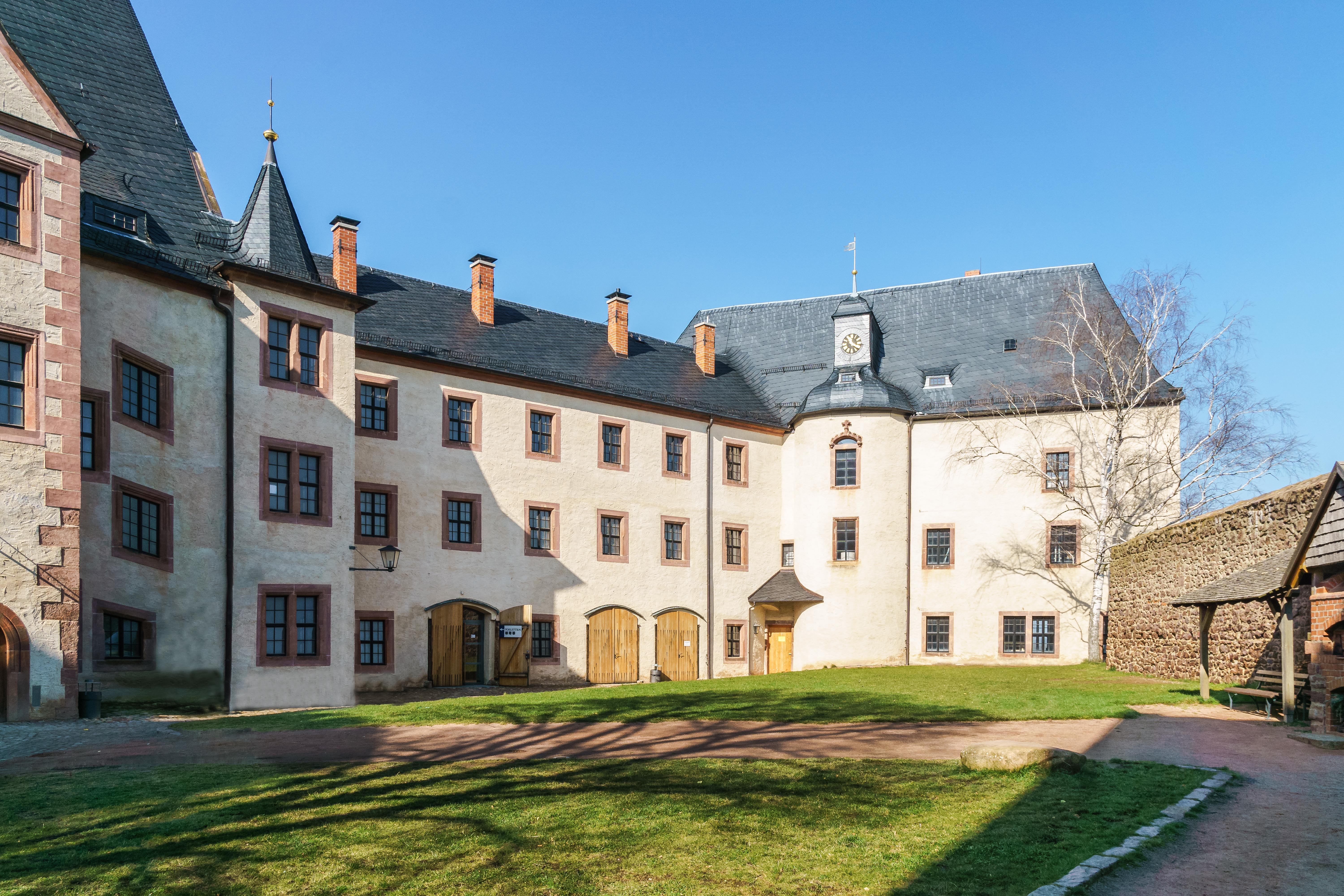 Pagenhaus Burg Mildenstein in Leisnig